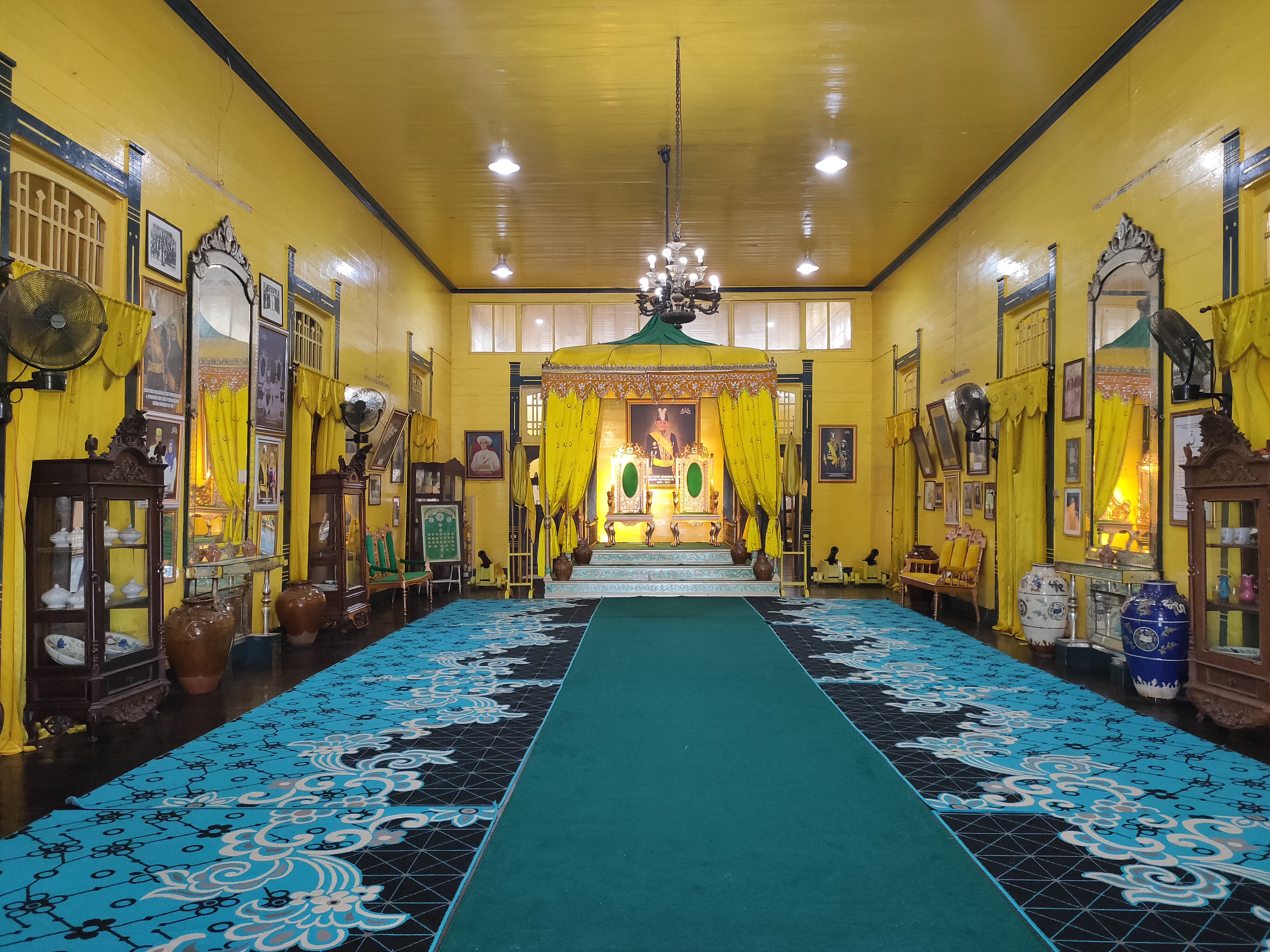 Keraton Kadariah adalah istana Kesultanan Pontianak yang dibangun pada dari tahun 1771 sampai 1778 masehi. Terletak di Jl. Tj. Raya 1, Dalam Bugis, Kec. Pontianak Tim., Kota Pontianak, Kalimantan Barat.